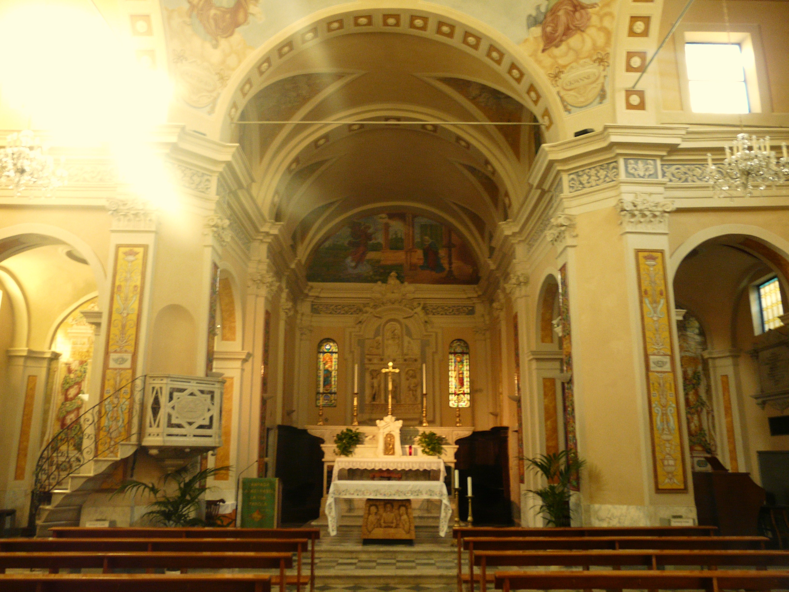 Chiesa dei Santi Giacomo e Cristoforo, Licciana Nardi, Toscana, Italia